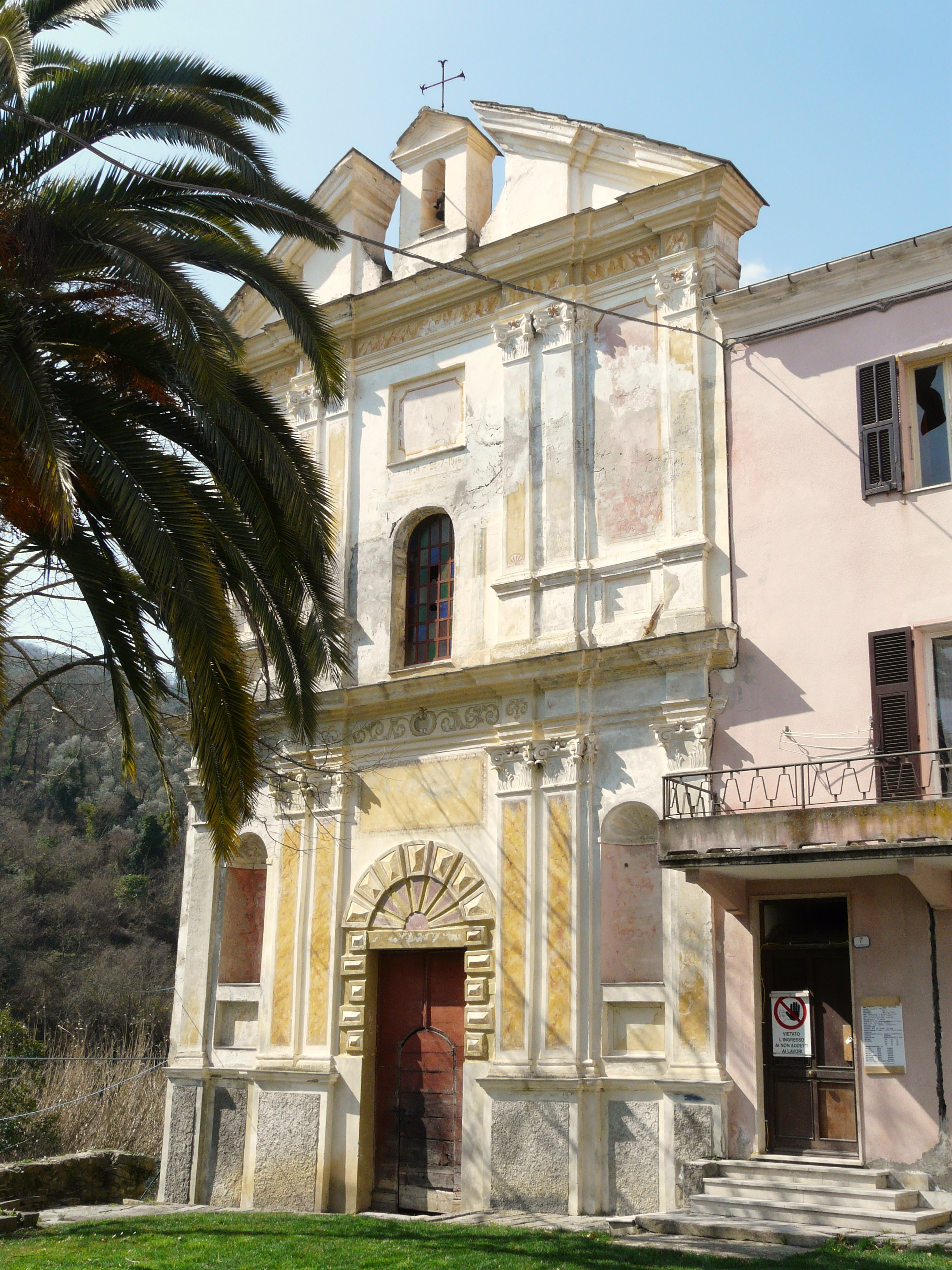 Ex oratorio presso la chiesa di San Giovanni del Groppo, Prelà, Liguria, Italia